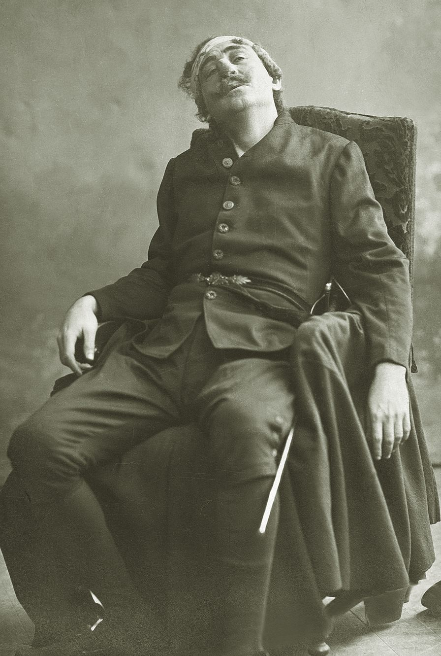 Pethes Imre (1864–1924) drámai színész Edmond Rostand Cyrano de Bergerac című színdarabjának főszerepében a Fővárosi Nyári Színházban 1900. május 19-én.